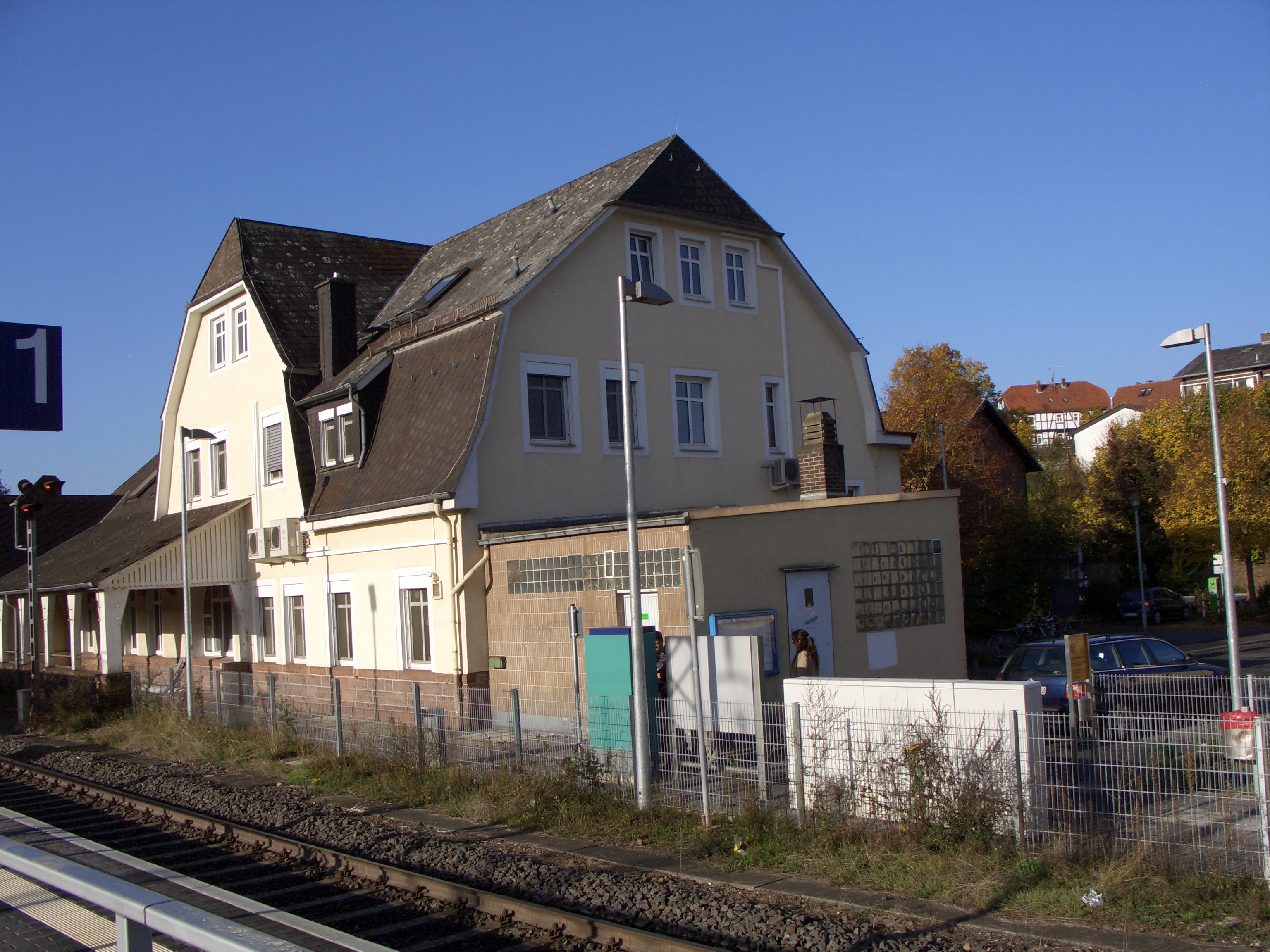 Das ehemalige Empfangsgebäude (heute Gemeindeverwaltung) von der Gleisseite aus gesehen.